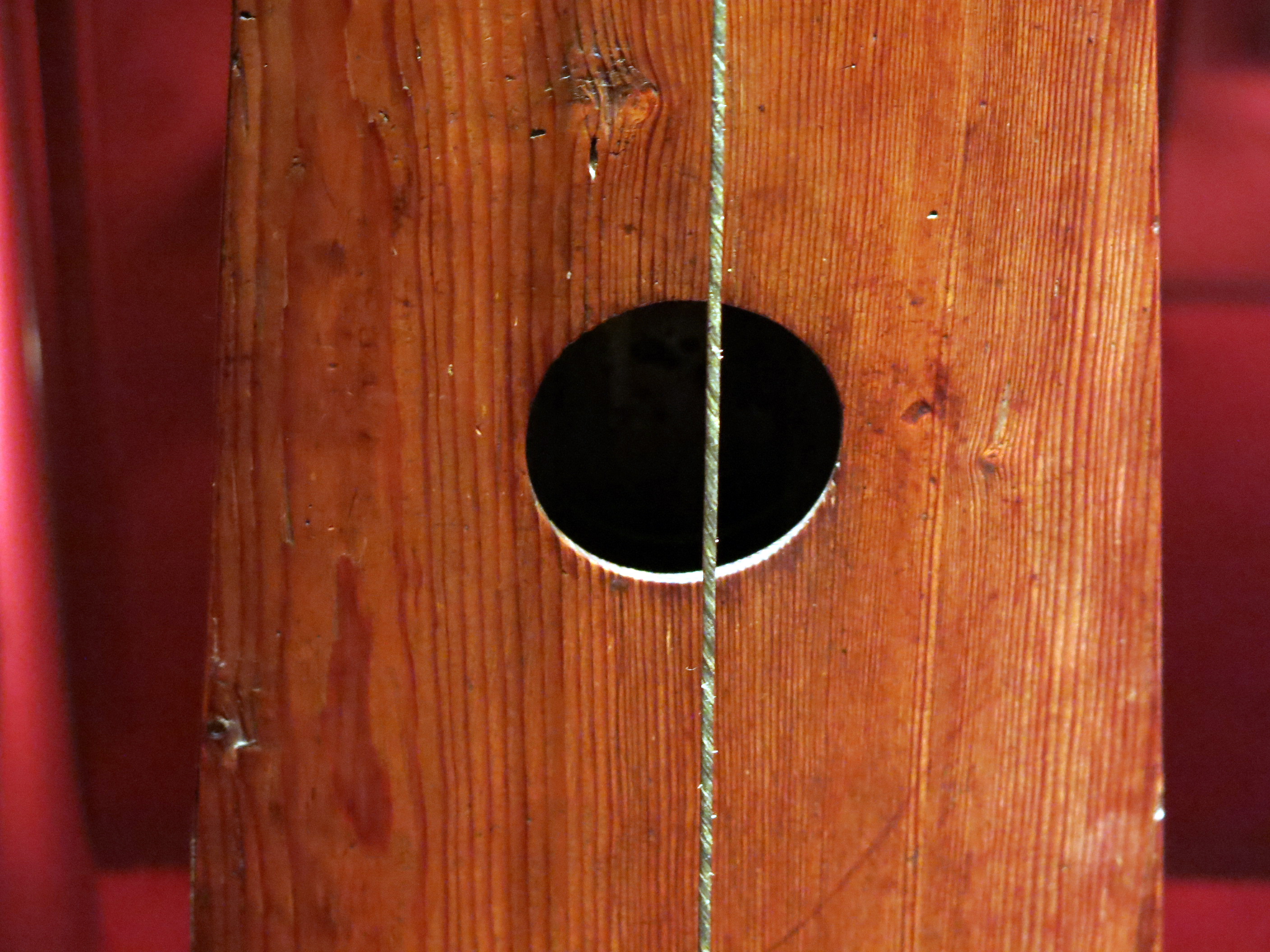 Trompa marina. Espanya. Segle XVII. Museu de la Música de Barcelona. (MDMB 417)